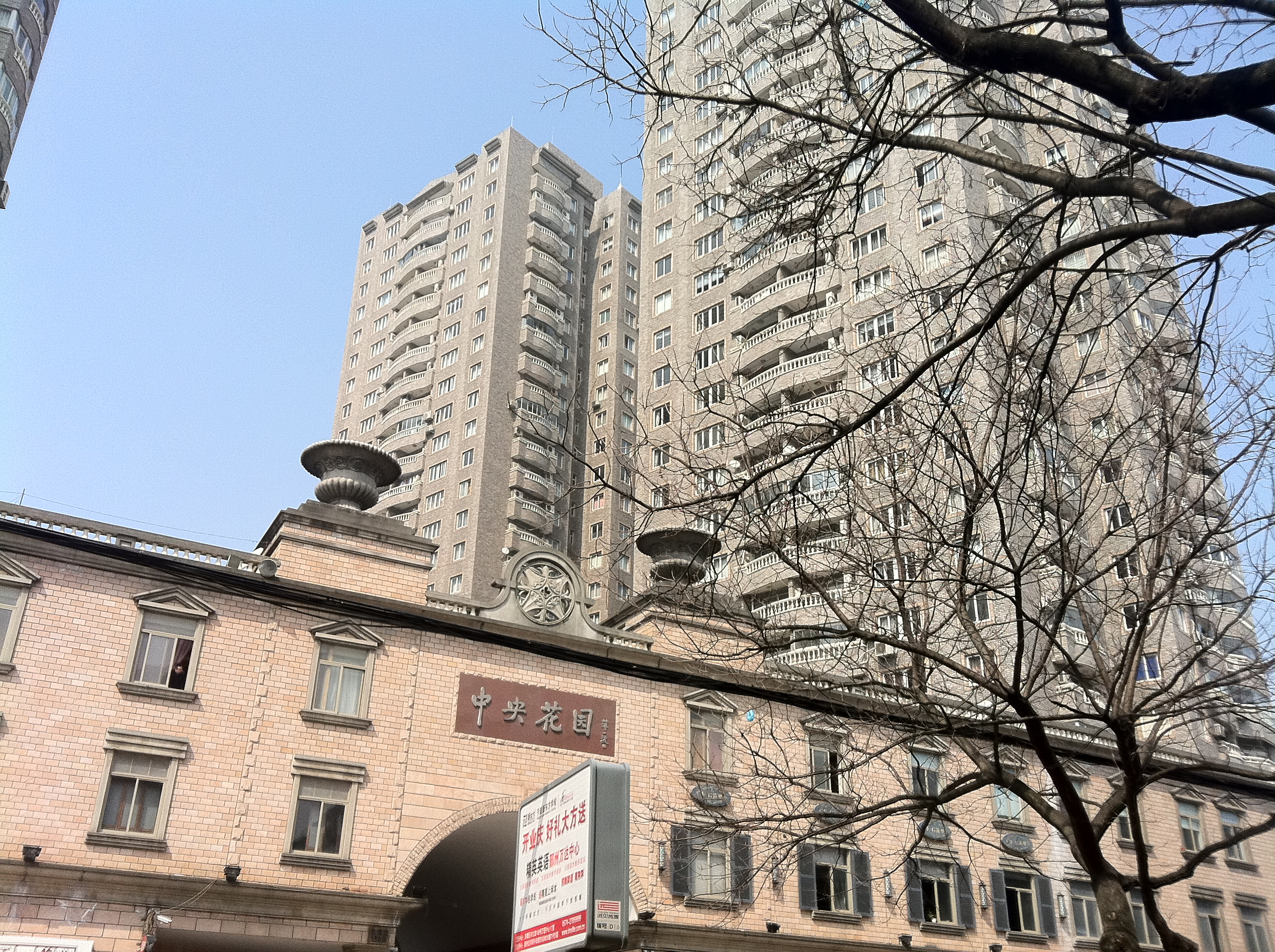 宁波孝闻街中央花园